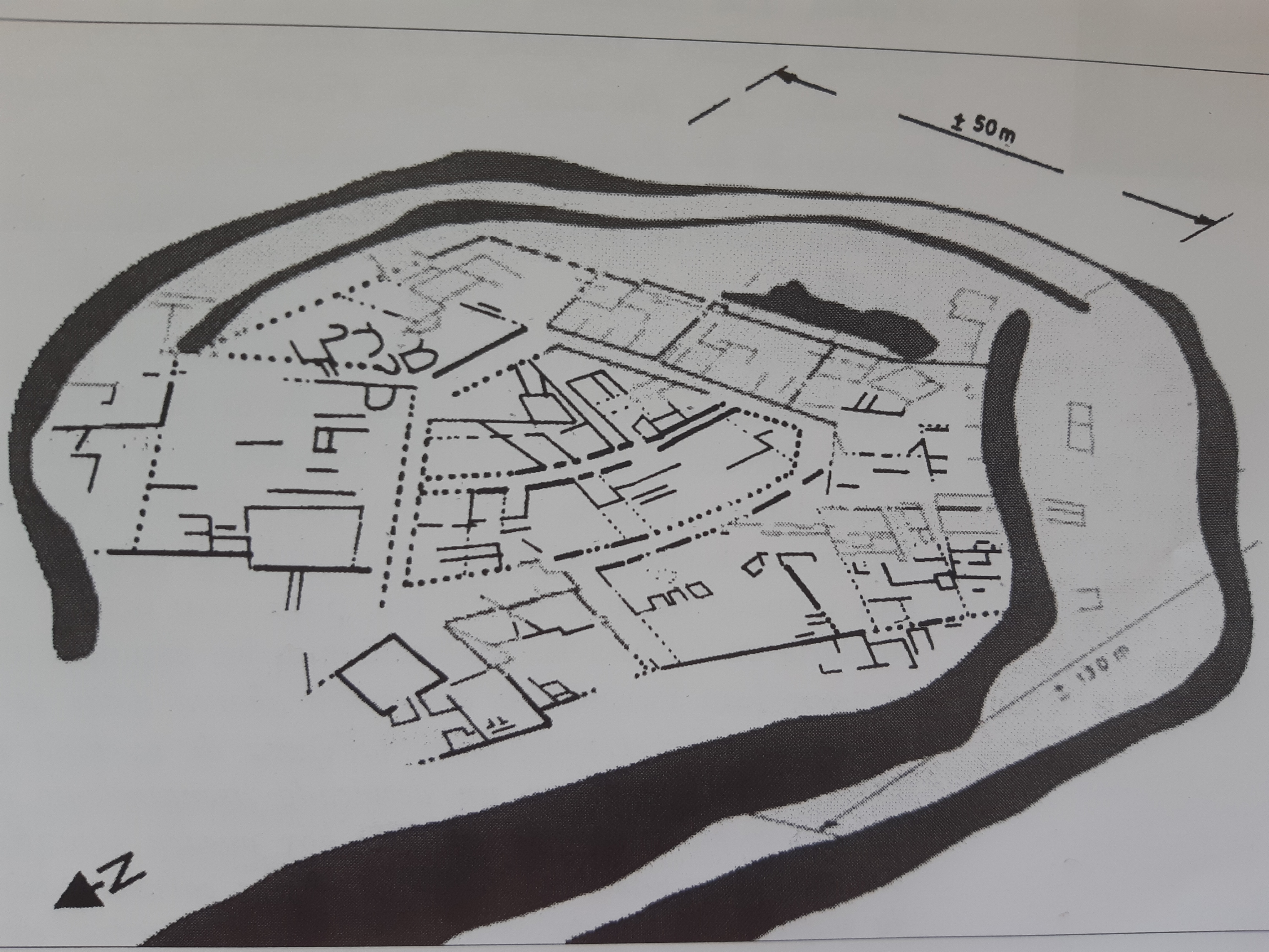 Es una interpretación de la ciudad antigua de Tritium Autrigonum, ciudad que estuvo situada en lo que hoy en día es Monasterio de Rodilla (Burgos). A partir de una fotografía aérea se elaboró posteriormente la interpretación de cómo pudo ser la ciudad